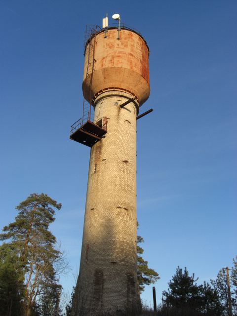 Водокачка